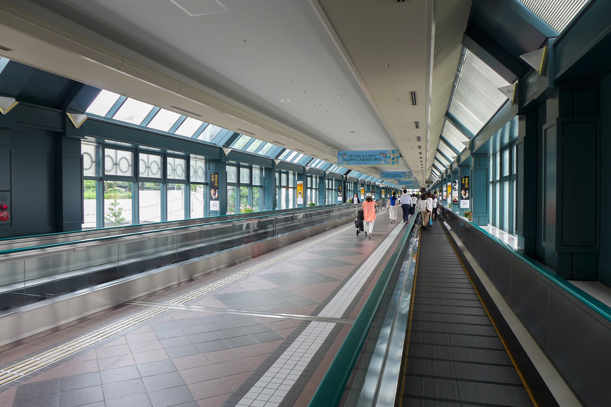 Yebisu Sky walk